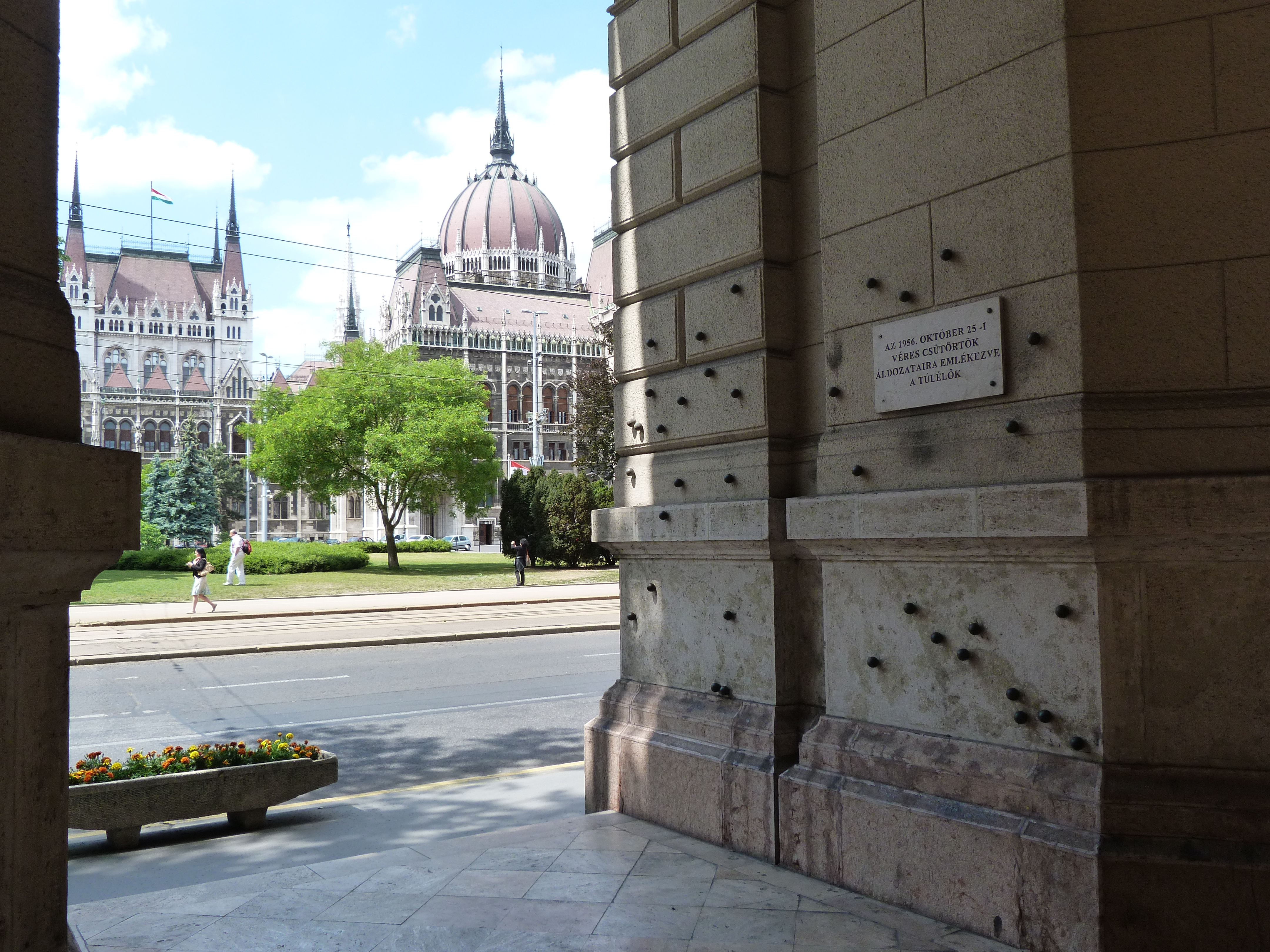 A felvétel 2012. május 19 -én készült Budapesten, a Kossuth téren. Véres csütörtök - 1956. október 25 -e - emléklap. ©©Derzsi Elekes Andor, Budapest, 2013, You are authorised to use these photos and vids under Creative Commons – even for commercial, for profit purposes. Photos must be attributed to Derzsi Elekes Andor. All of the photos and vids in the Metapolisz DVD line are under Creative Commons and can be used even for commercial – for profit – purposes. Recommended Citation Derzsi Elekes Andor: Metapolisz DVD line